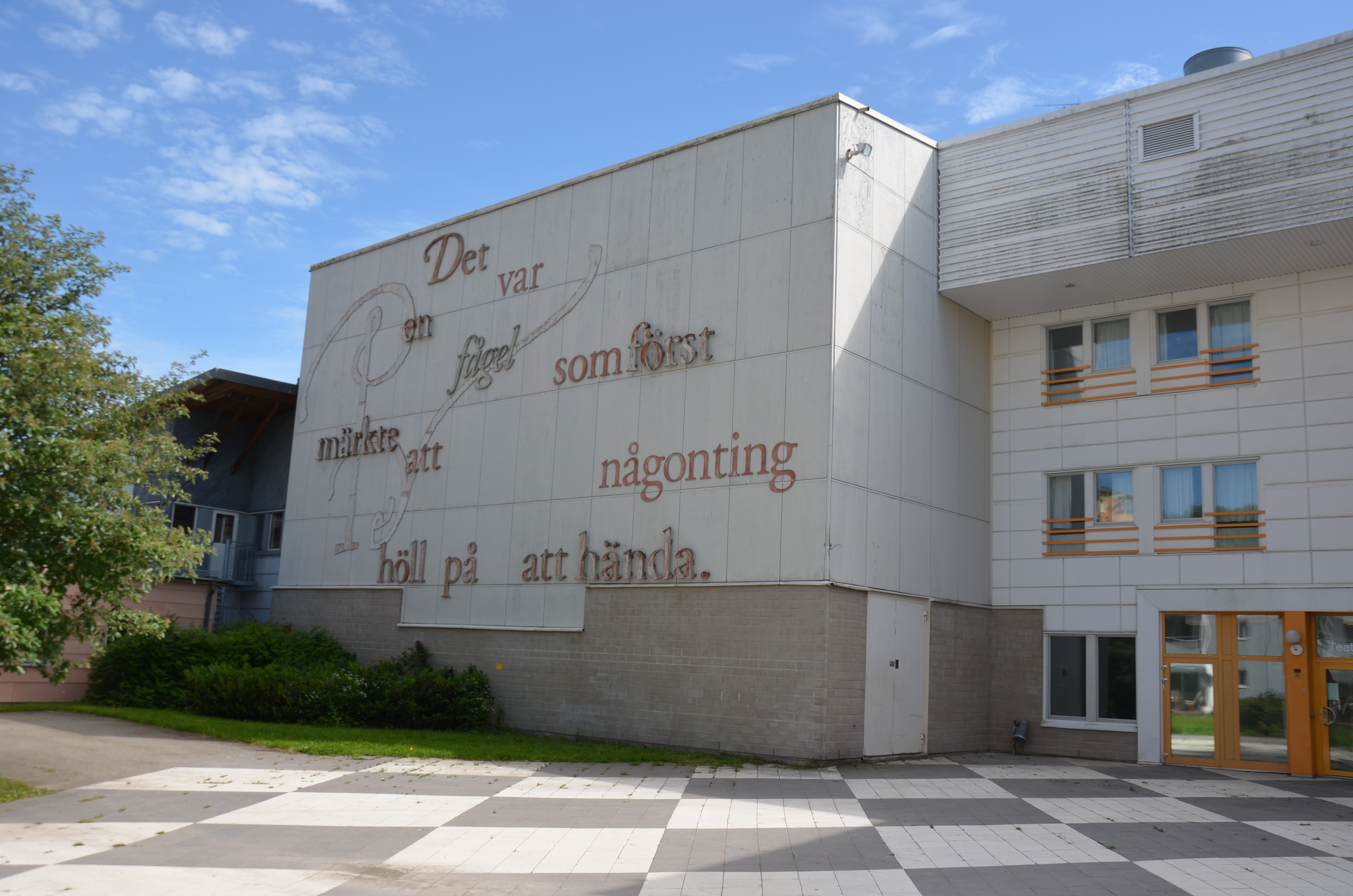 Annie Winblads fasadutsmyckning på Riksteaterns fasad, Boitkyrka